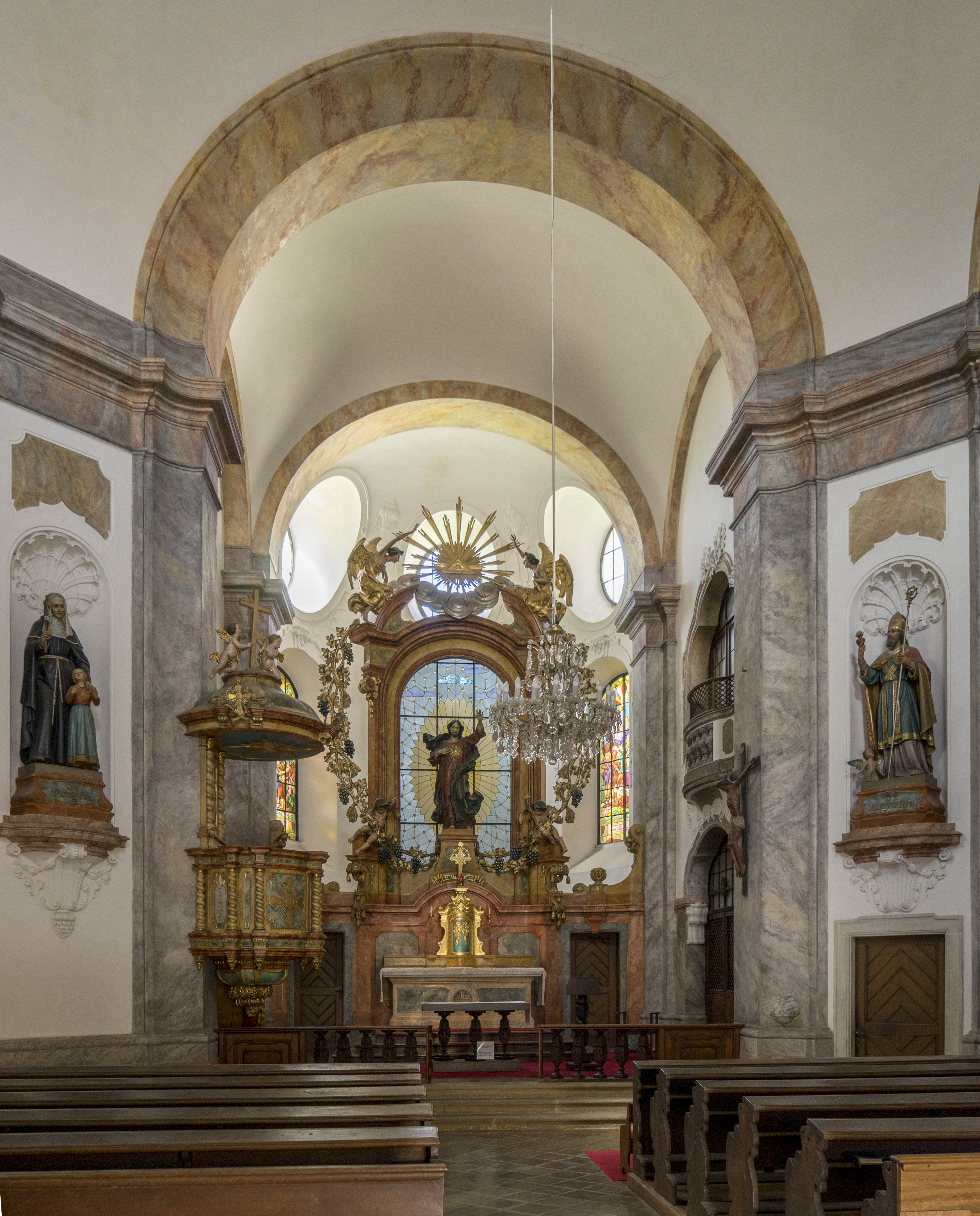 Ursuline monastery, interior, Kurna Hora